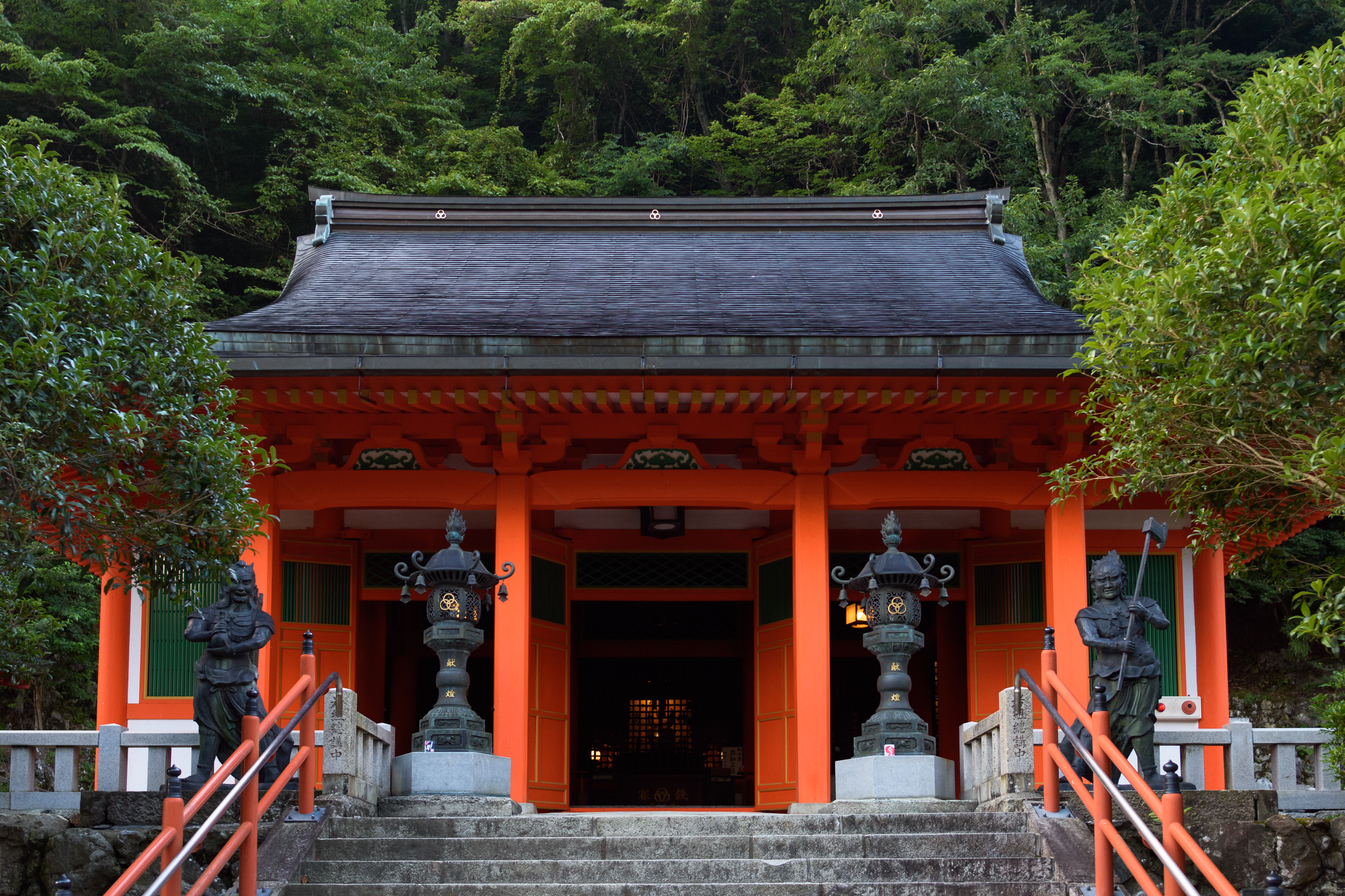 洞川の龍泉寺本堂